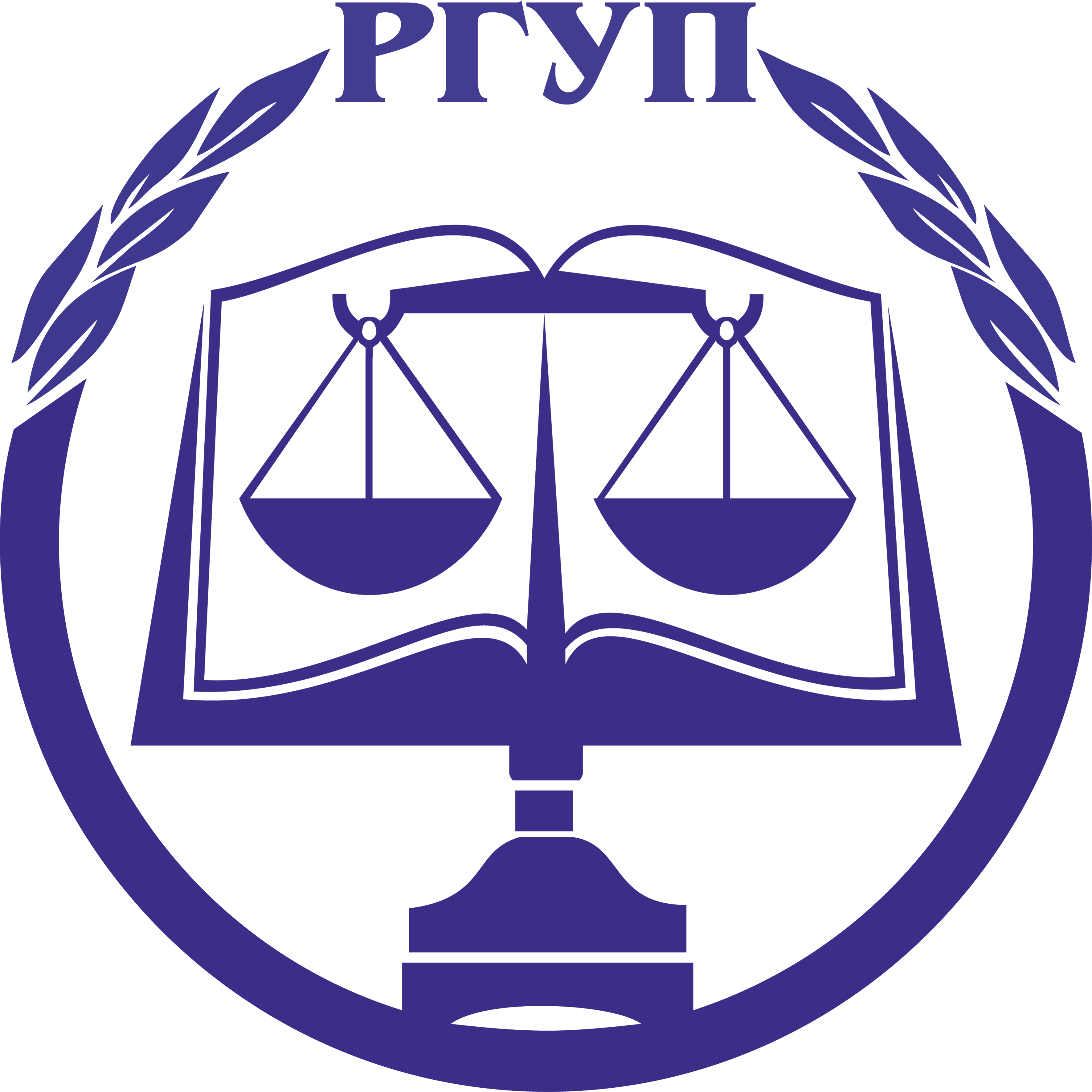 Логотип Российского государственного университета правосудия